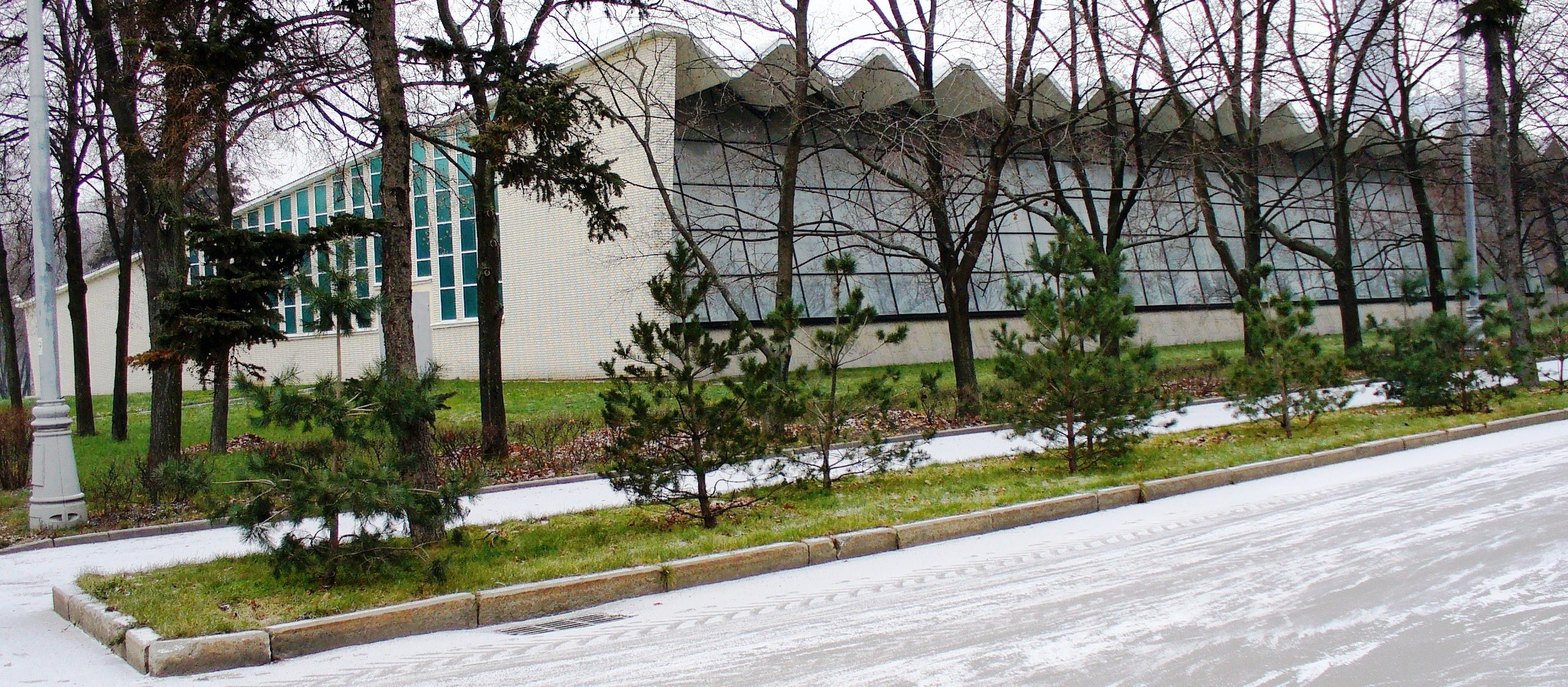 Спортивный комплекс Лужники. Каток Кристалл